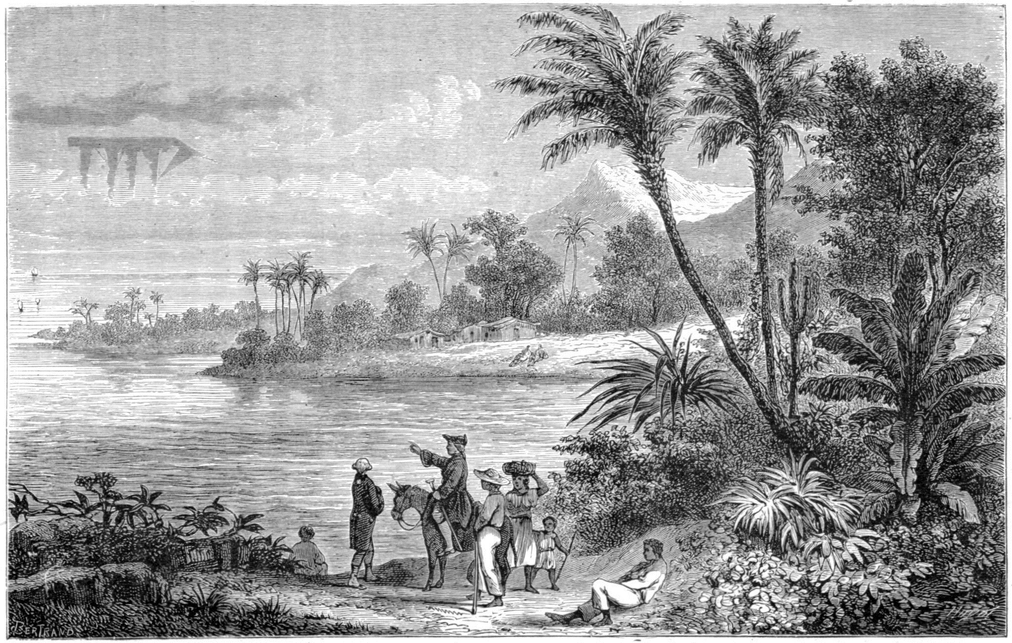 Mirage à l'île de France (vaisseau à 4 mâts). Illustration de "Histoires des météores", p. 311